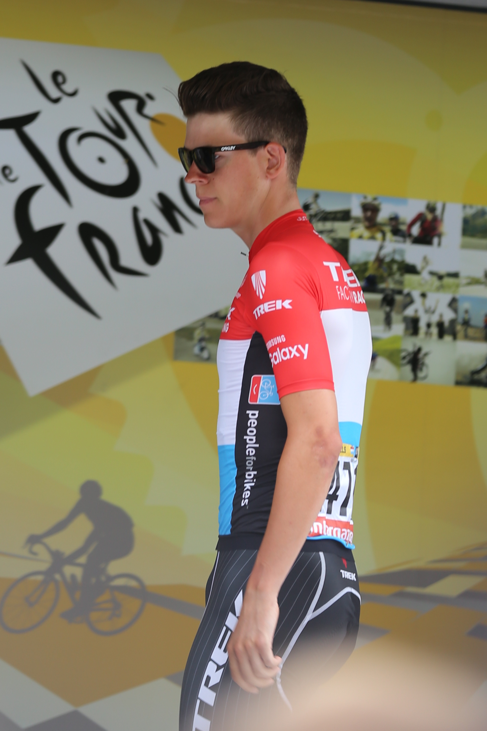 Bob Jungels lors du départ de la 8e étape du Tour de France 2015 à Rennes.